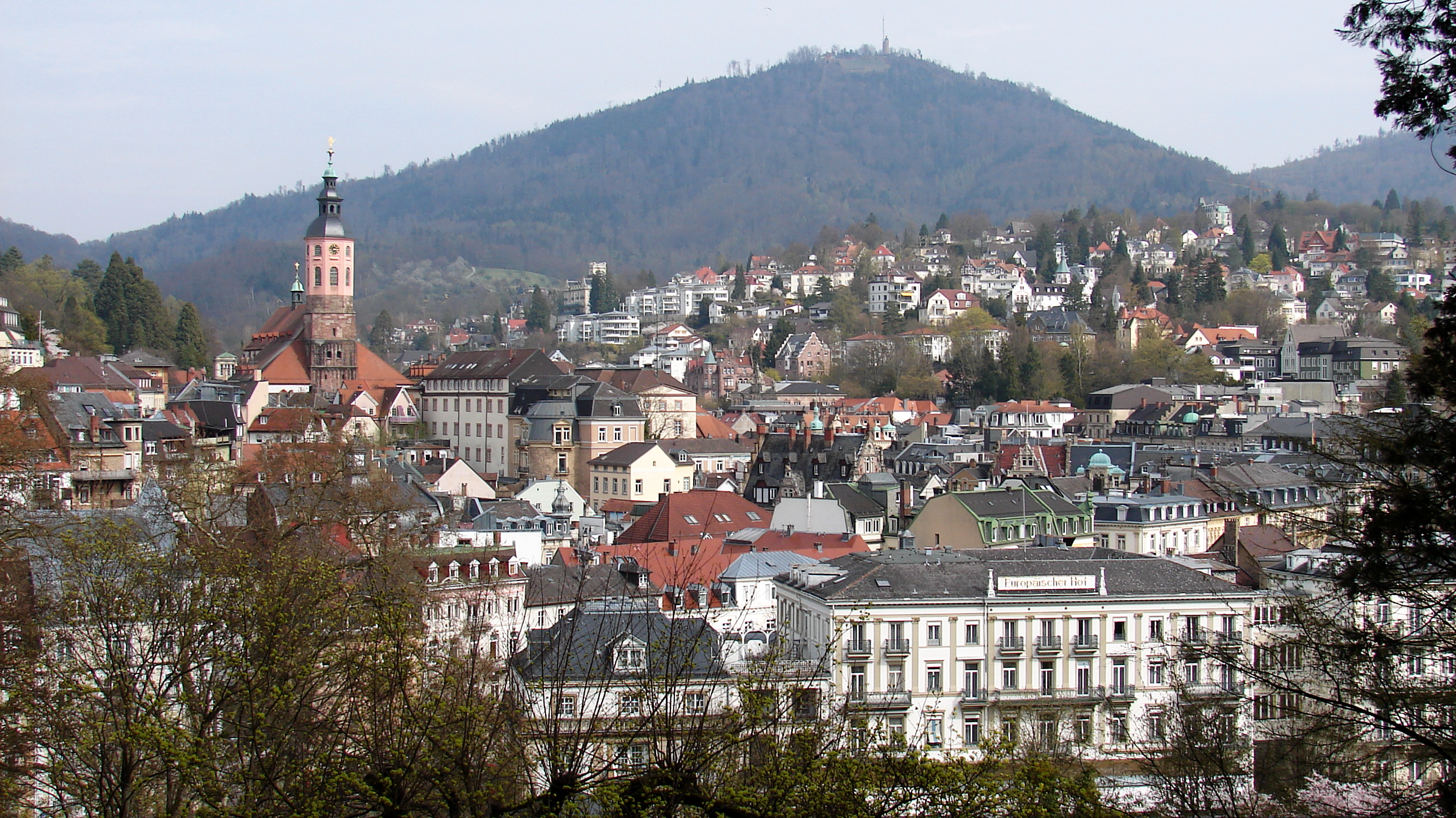 Baden-Baden ist der kleinste Stadtkreis Baden-Württembergs und liegt im Westen des Landes. Der Ort ist als Kur- und Bäderstadt sowie als Medien-, Kunst- und internationale Festspielstadt bekannt.